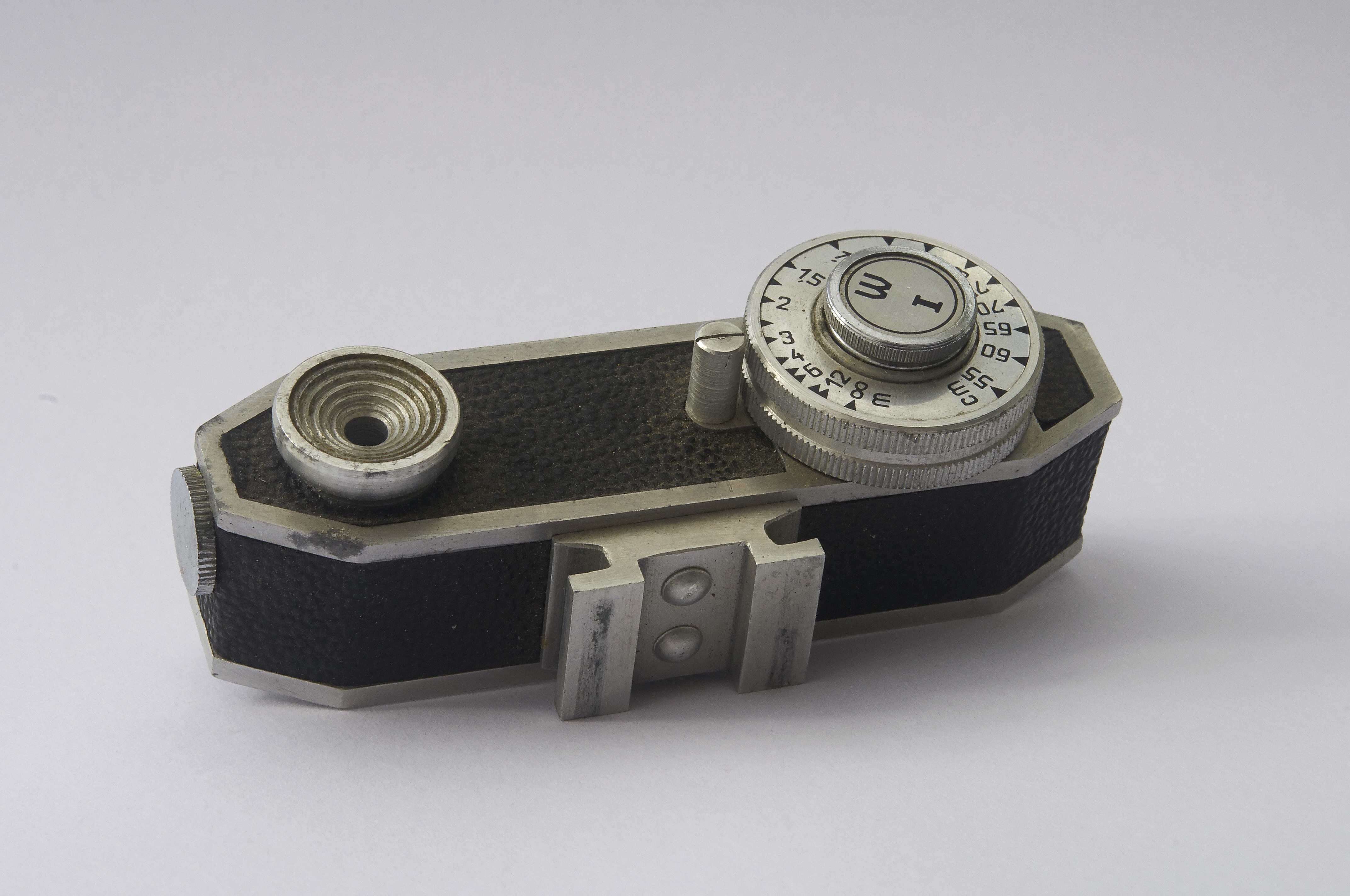 Watameter, een afstandsmeter te gebruiken op een fototoestel om daarmee de juiste afstand op de camera in te stellen